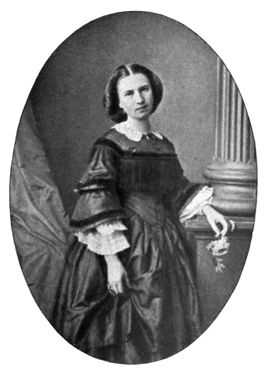 Bertha Bonn. In: Ferdinand Bonn, Gesammelte Werke, Band 2. Leipzig: Xenien, 1911